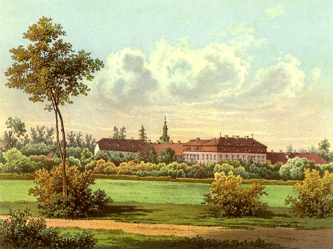 Rittergut Witzschersdorf, Kreis Merseburg